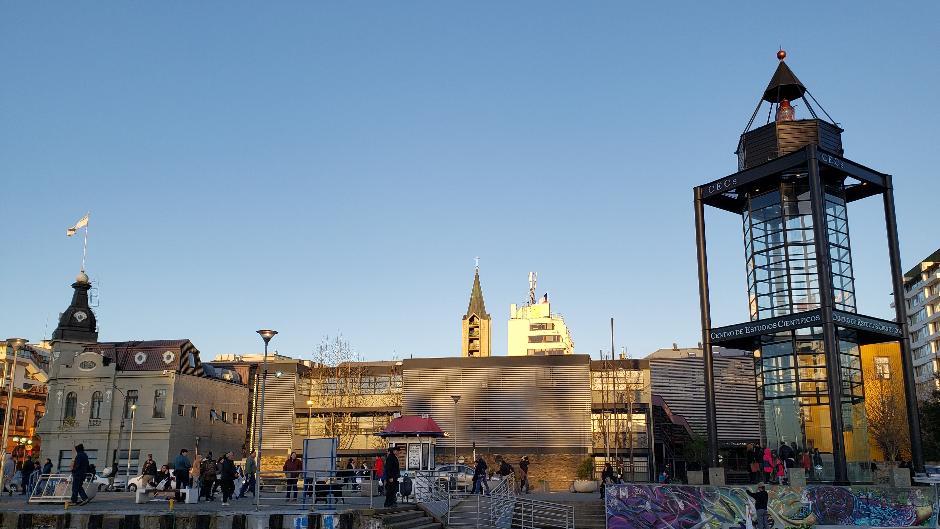 Vista general del Centro de Estudios Científicos (CECS) en Valdivia, Chile